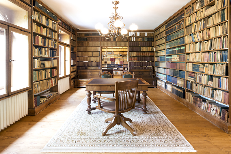 Große Bibliothek, Wilhelm Ostwald Museum, 2014, Copyright: Gerda und Klaus Tschira Stiftung